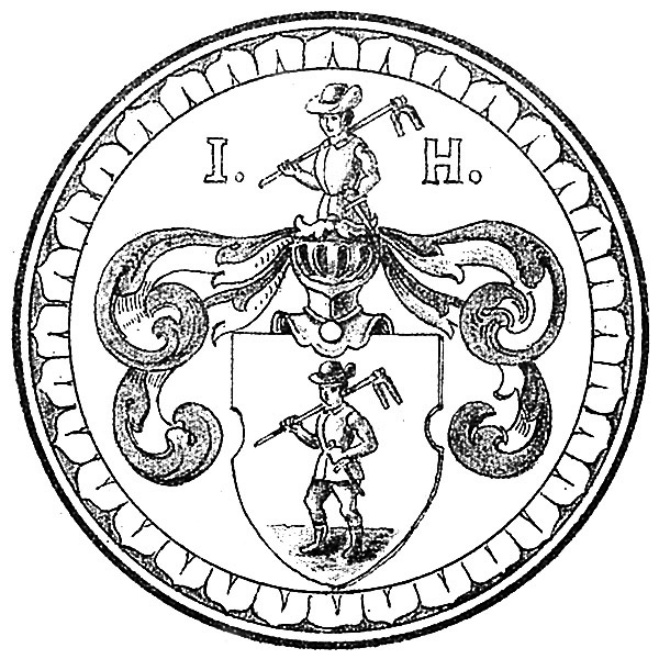 Wappen der Heilbronner Patrizier Albrecht